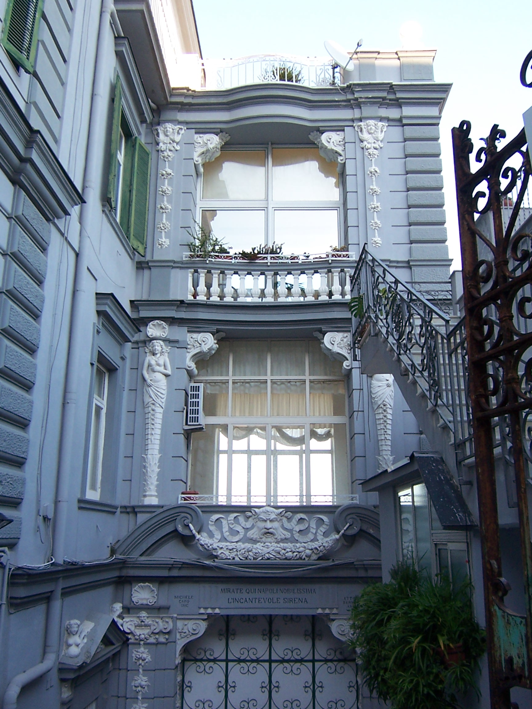 Villino Elena e Maria a San Martino, Vomero, Napoli